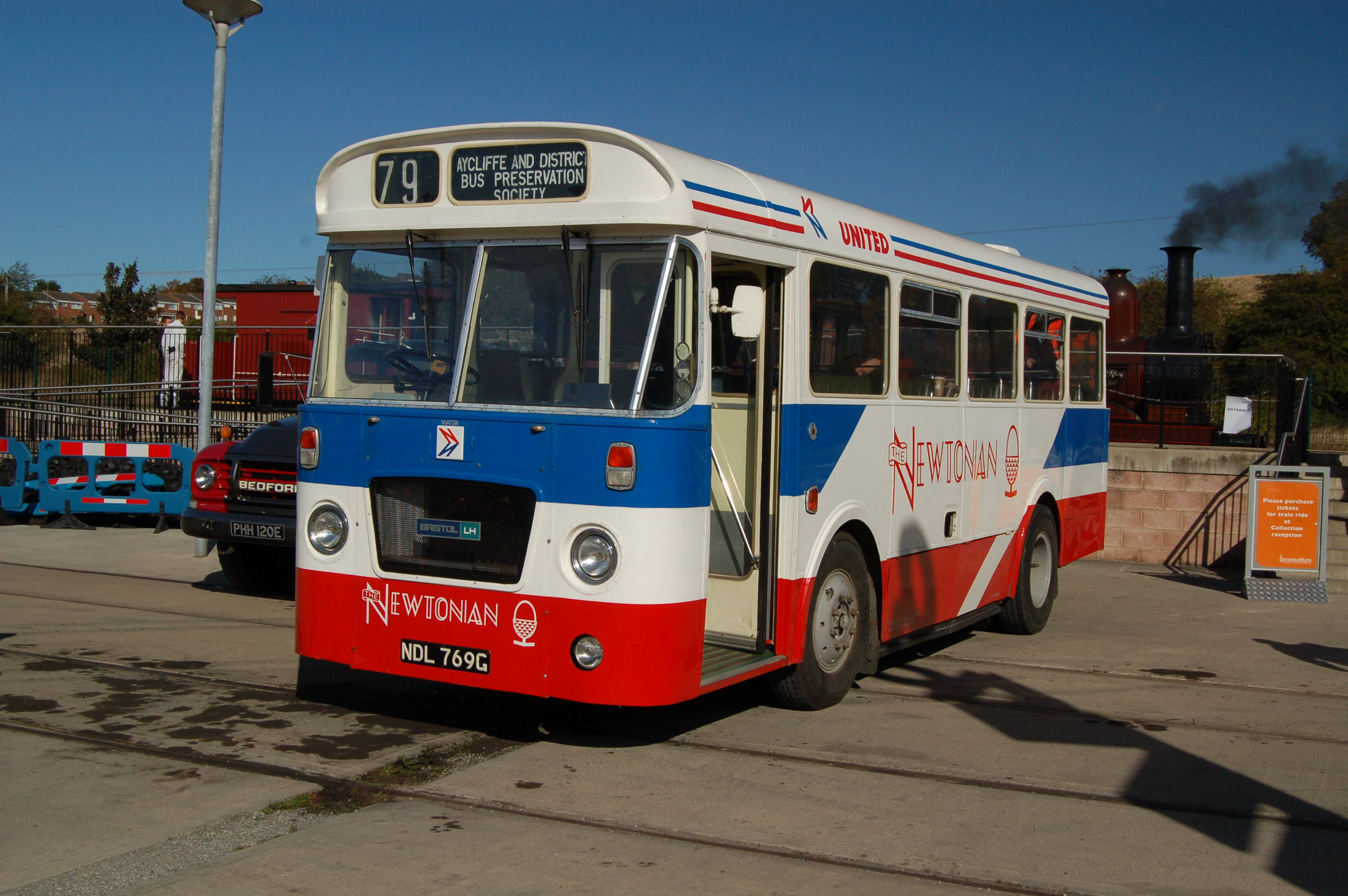 Bristol LH